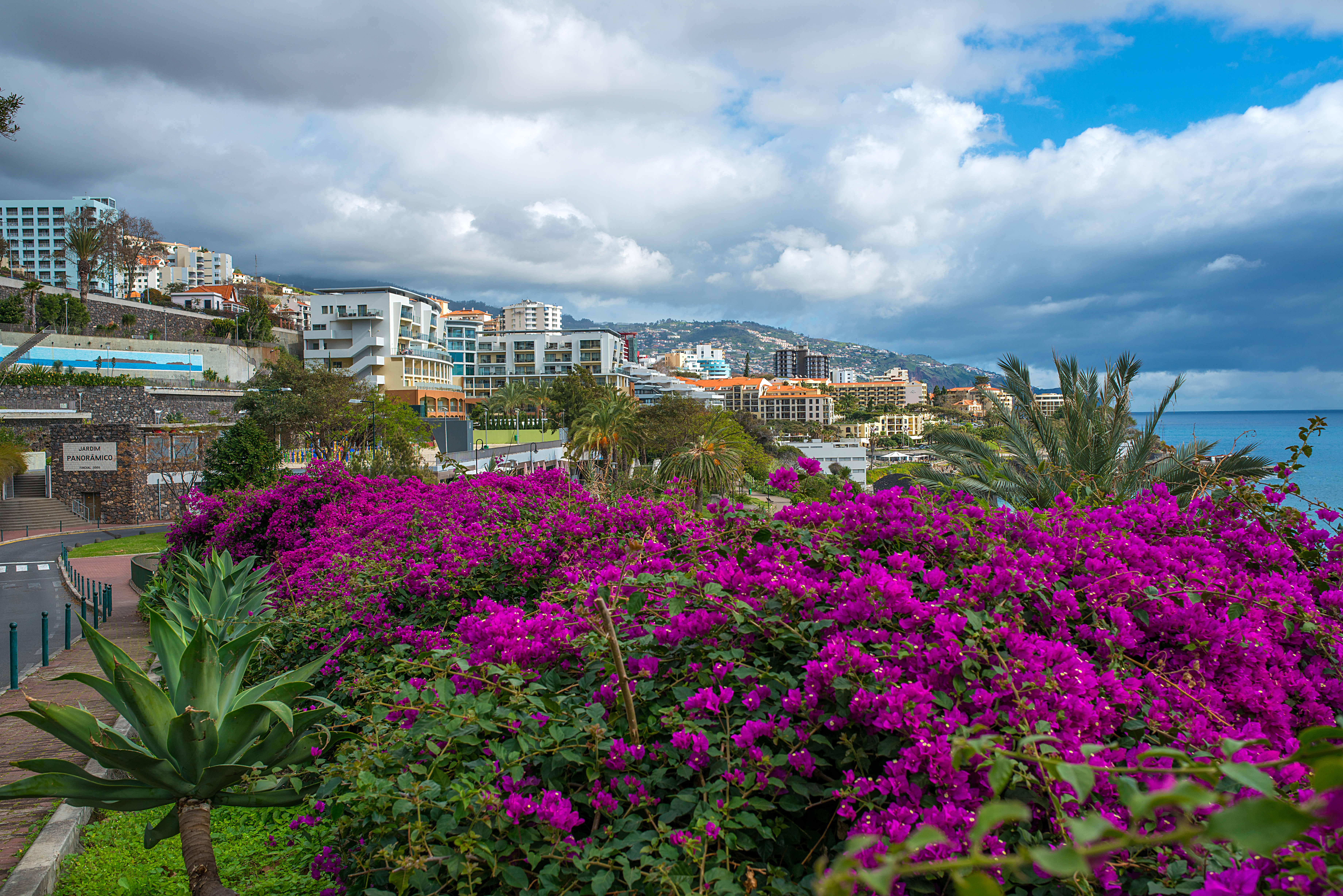 Funchal Madeira Portugal January 2014